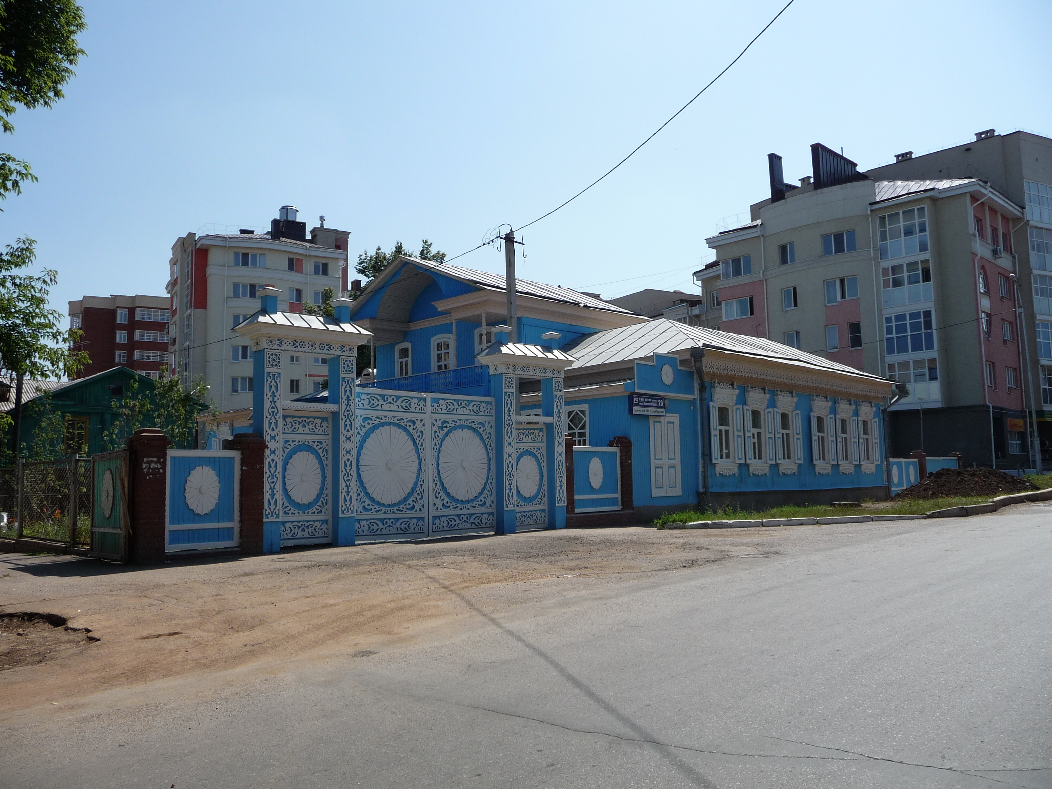 Дом, в котором жил и работал революционер Шагит Худайбердин: улица Новомостовая, 20, Уфа, Башкортостан